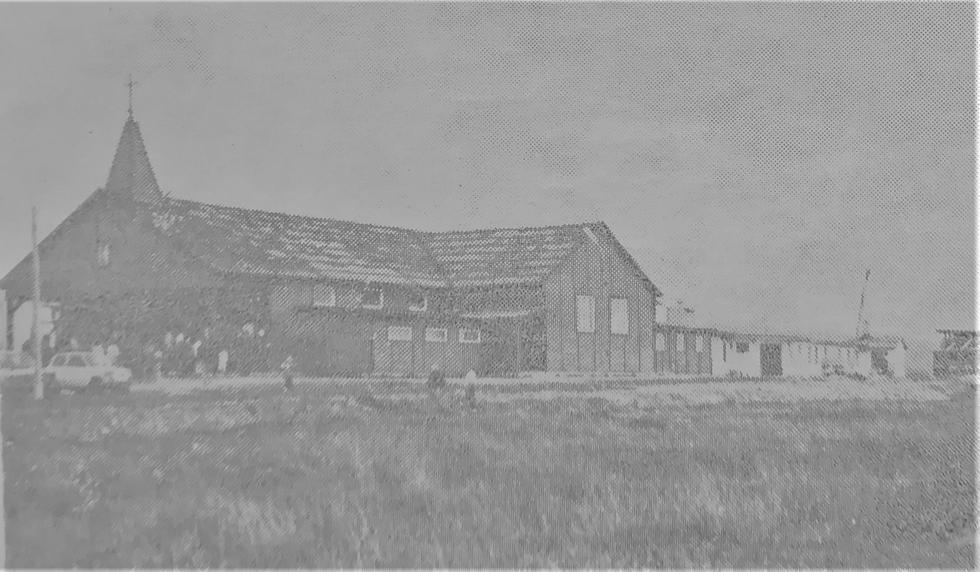 Kościół Świętego Ducha w Białymstoku - stary barak. Około 1992 r.